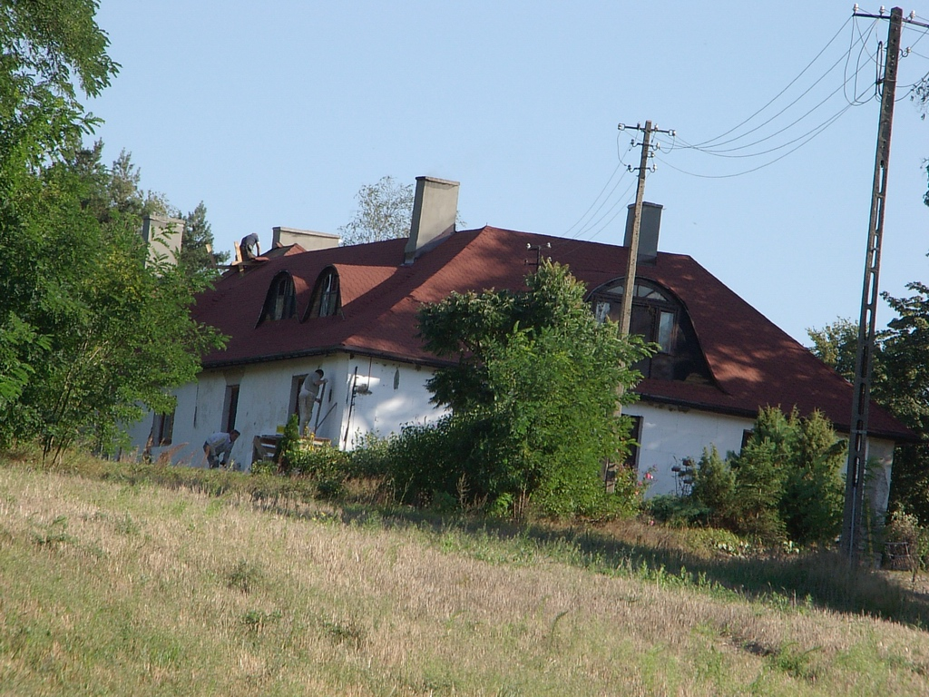 Dwór w Starych Skoszewach koło Łodzi. Manor house in Stare Skoszewy near Łódź. Bogdan Janus, Łódź, Poland